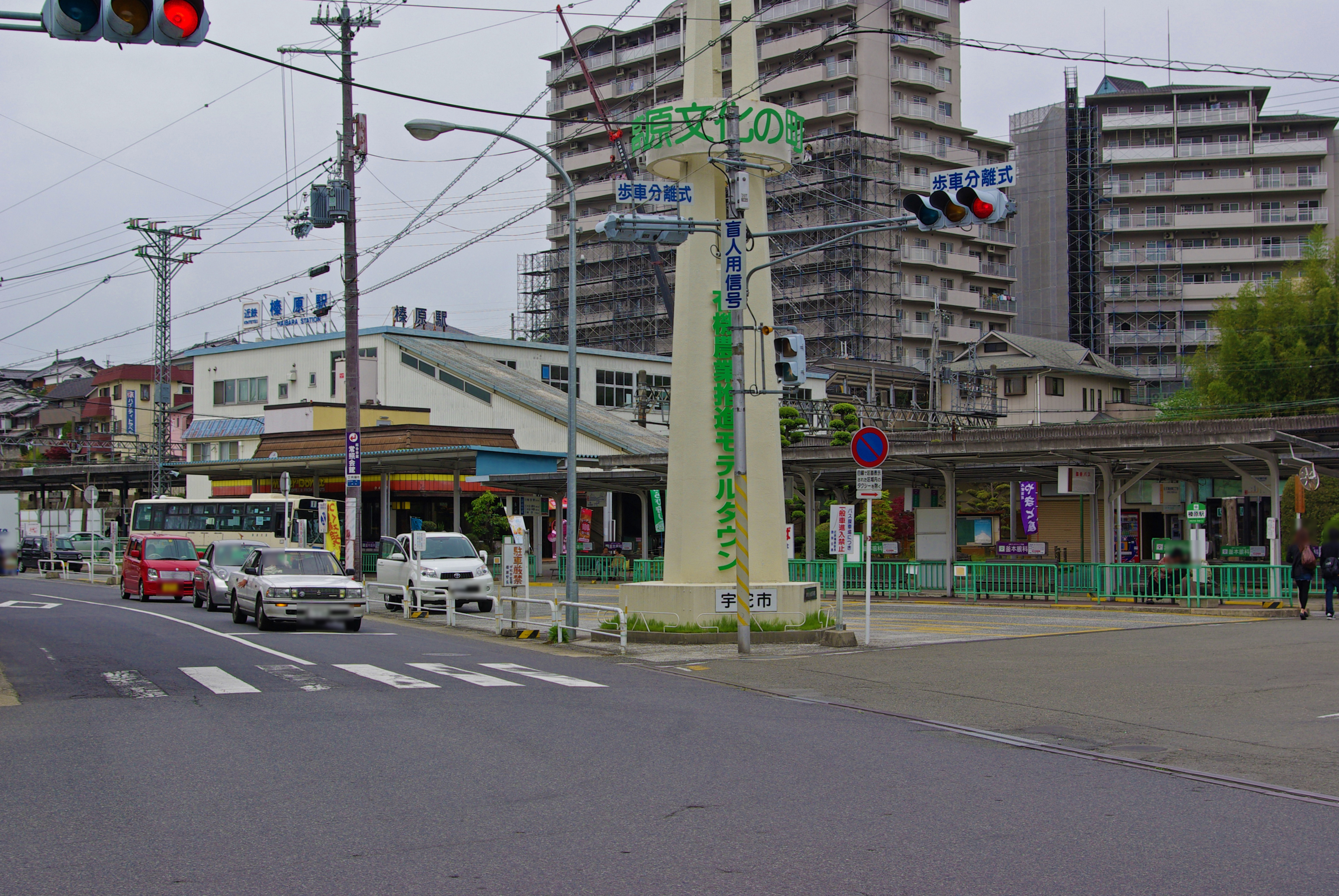 近畿日本鉄道大阪線榛原駅